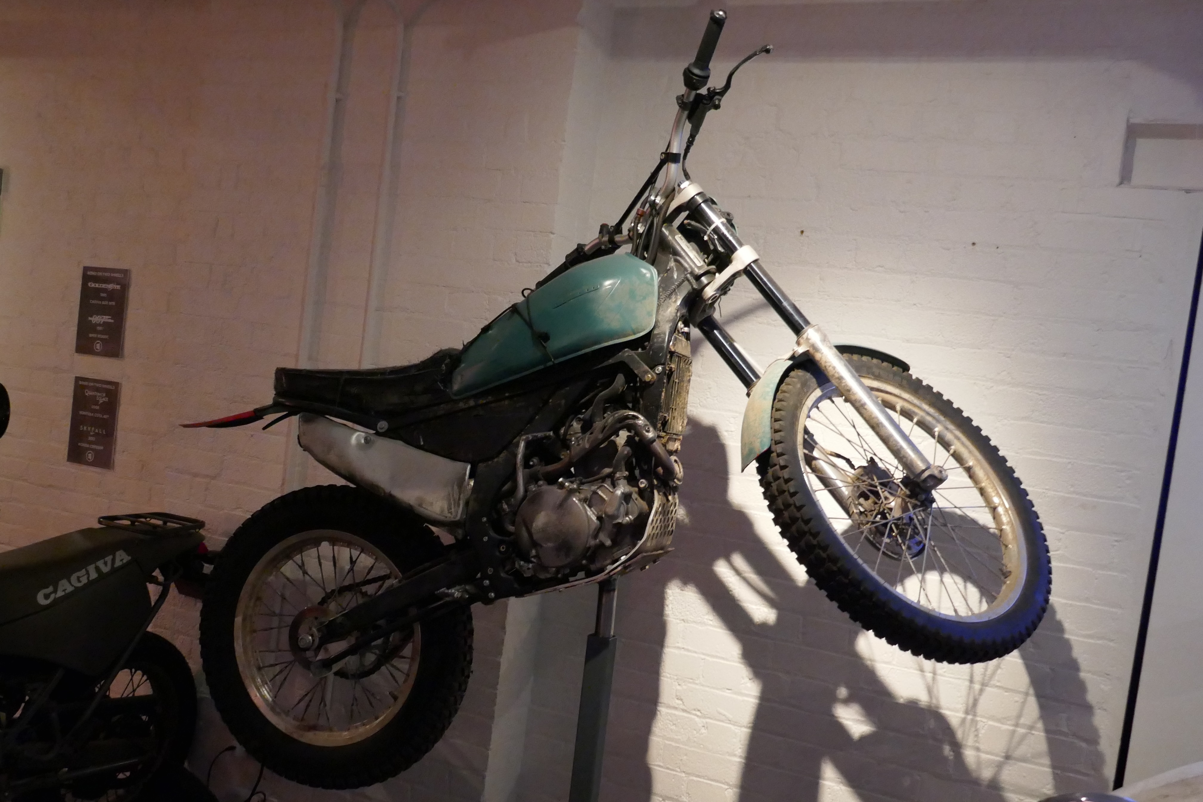 Quantum of Solace - Montesa Cota 4RT